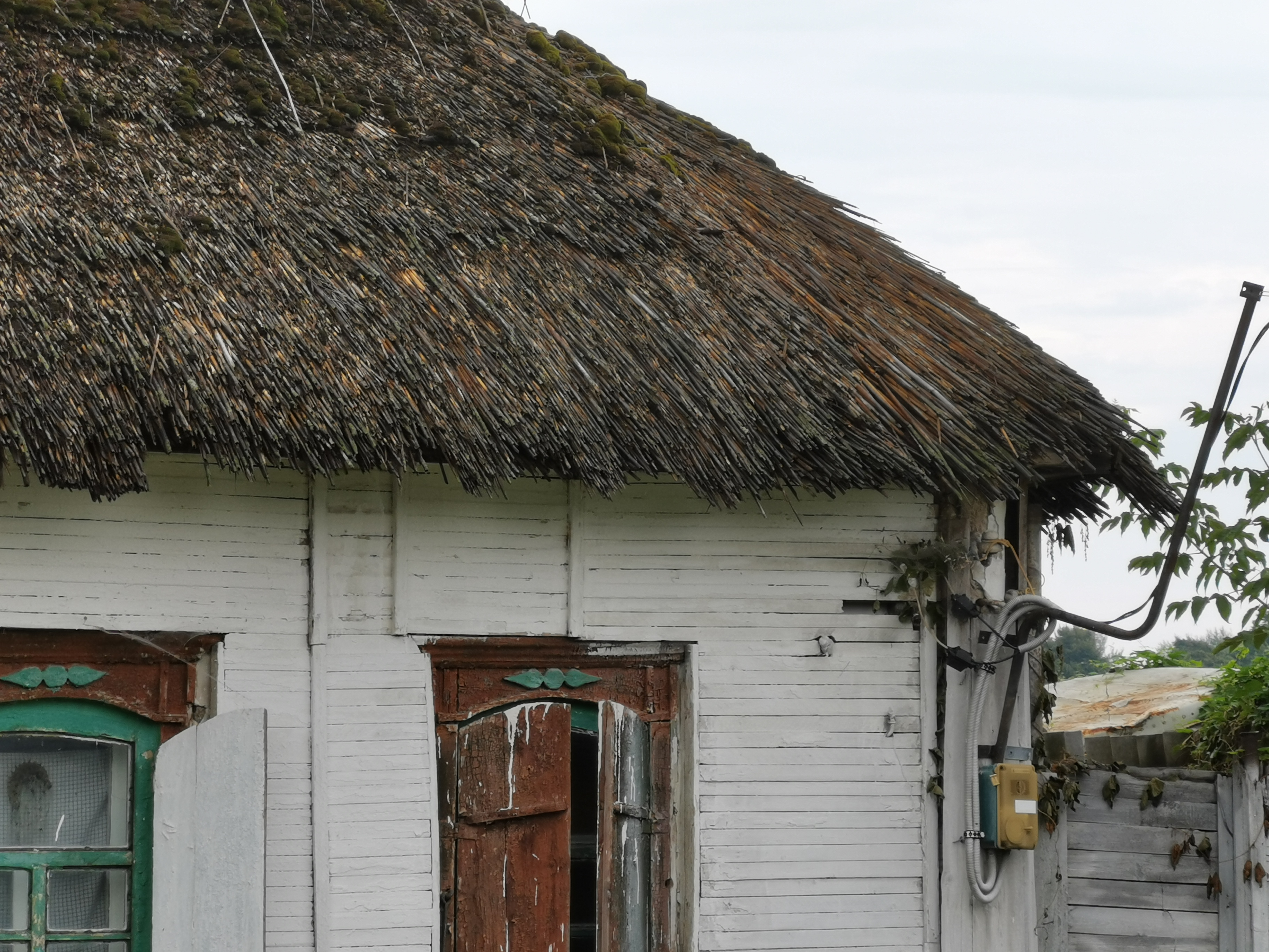 Типичный украинский дом, который находится в городе Валуйки по адресу улица Володарская, 27.